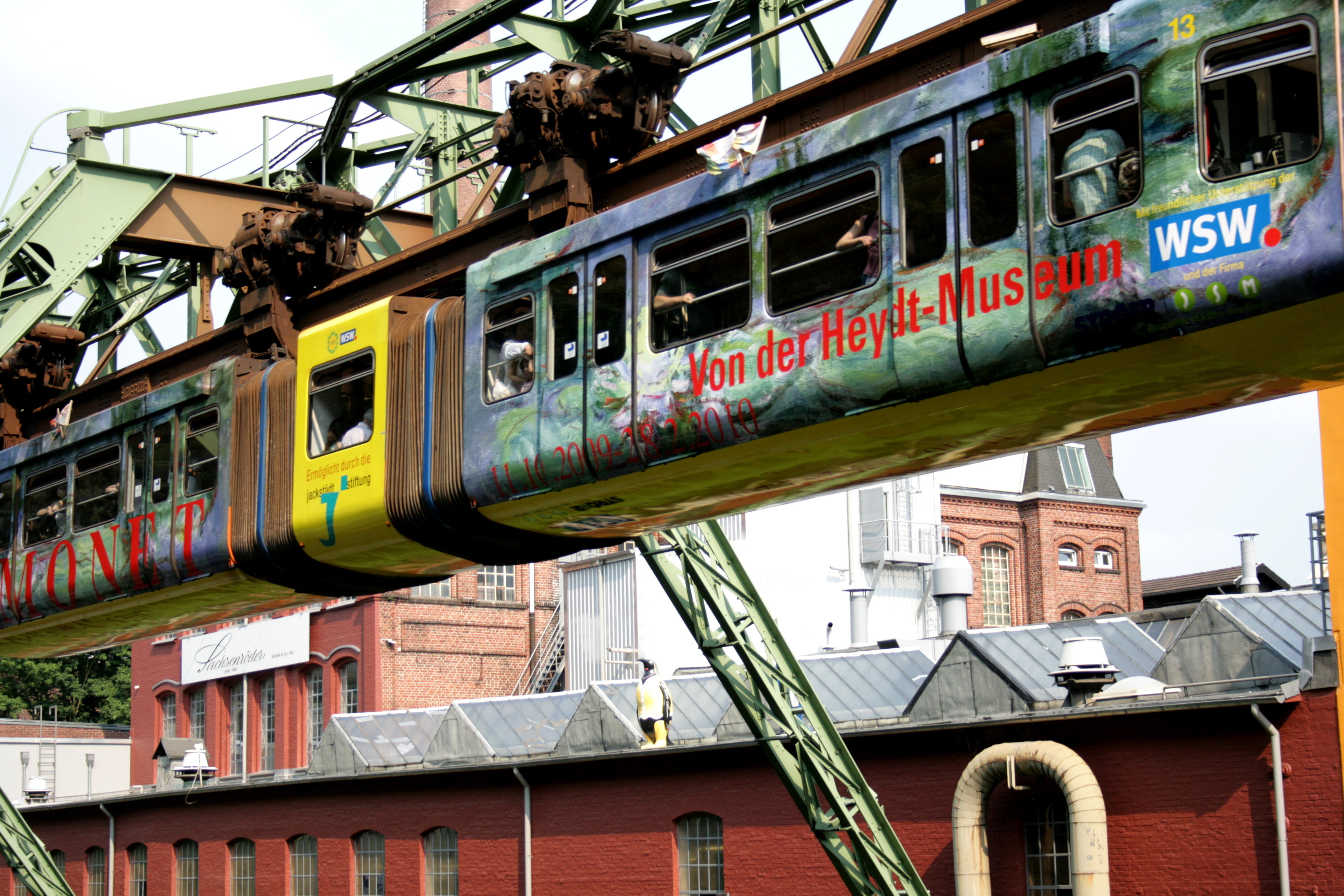 Sachsenröder GmbH & Co. KG in Wuppertal